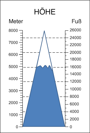 Berghöhe in Meter und Fuß.